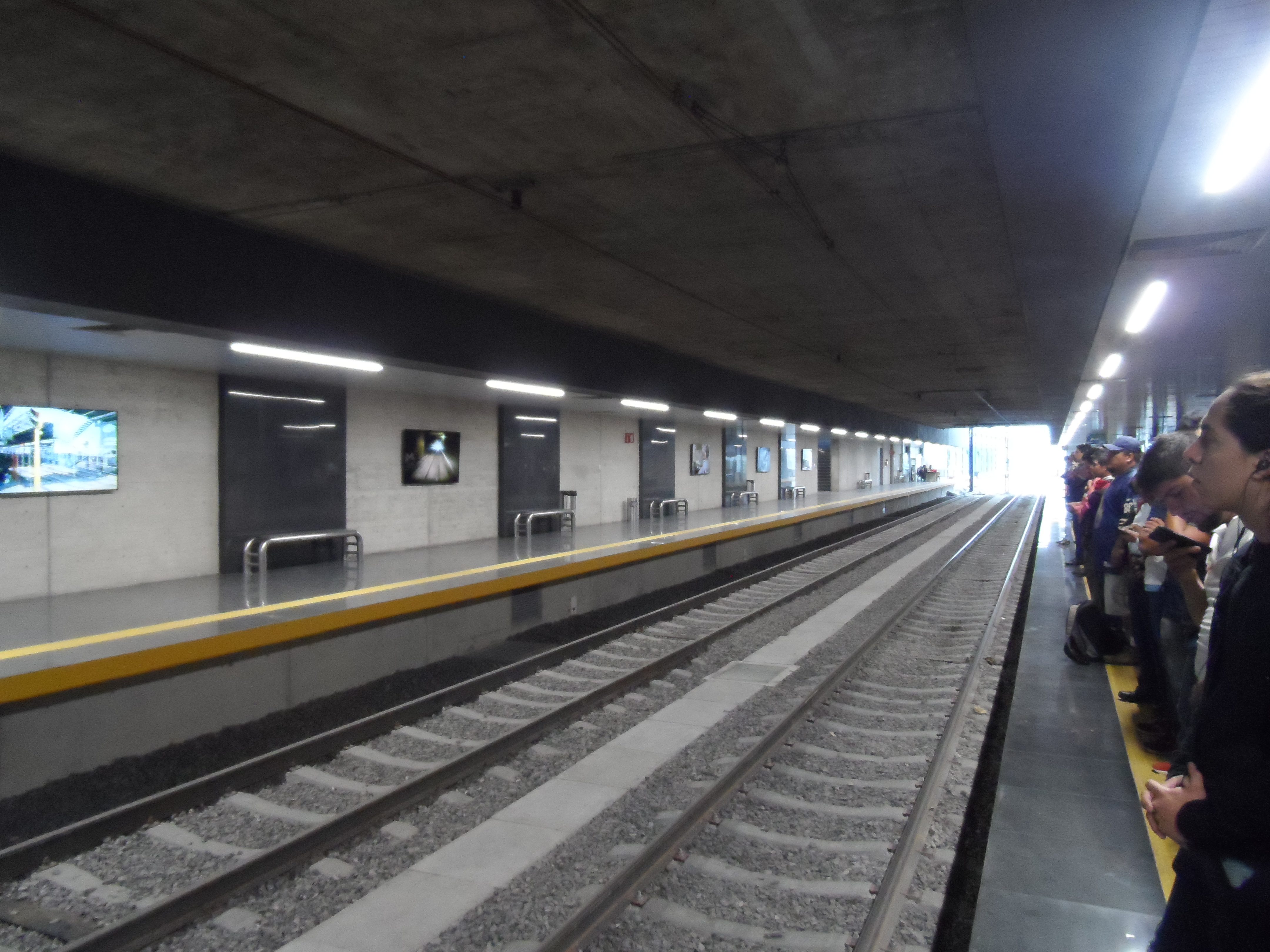 La nueva estación "Periférico Norte" de la Línea 1 del Tren Ligero de Guadalajara.